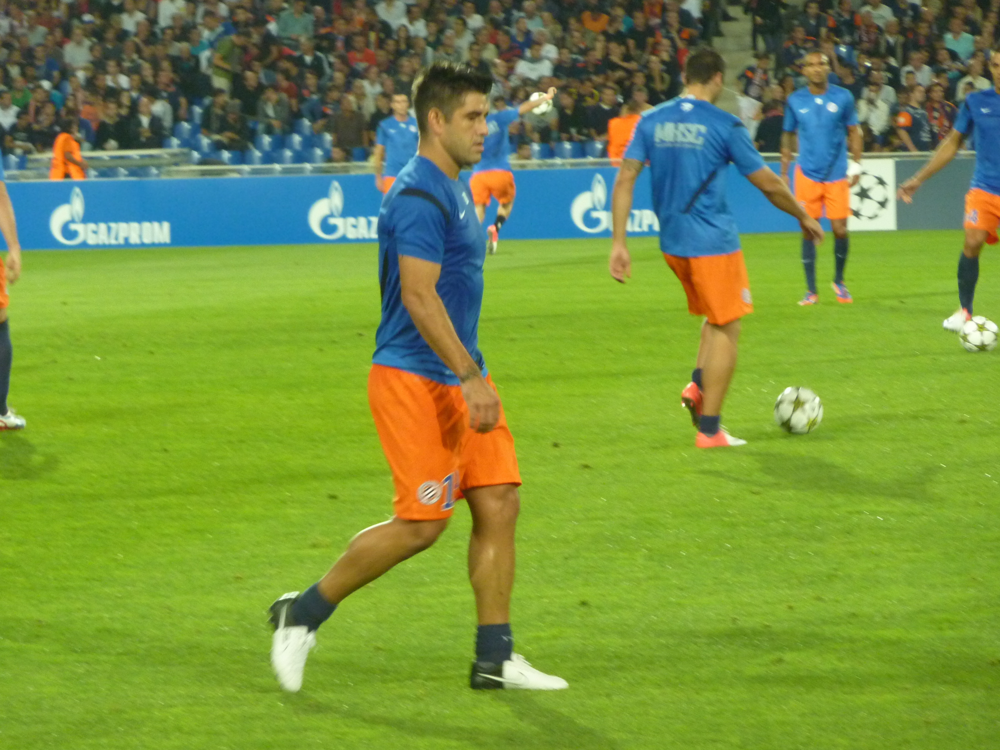 Marco Estrada lors du match MHSC - Arsenal (Ligue des Champions, Phase de poules, 1er match, 18/09/2012